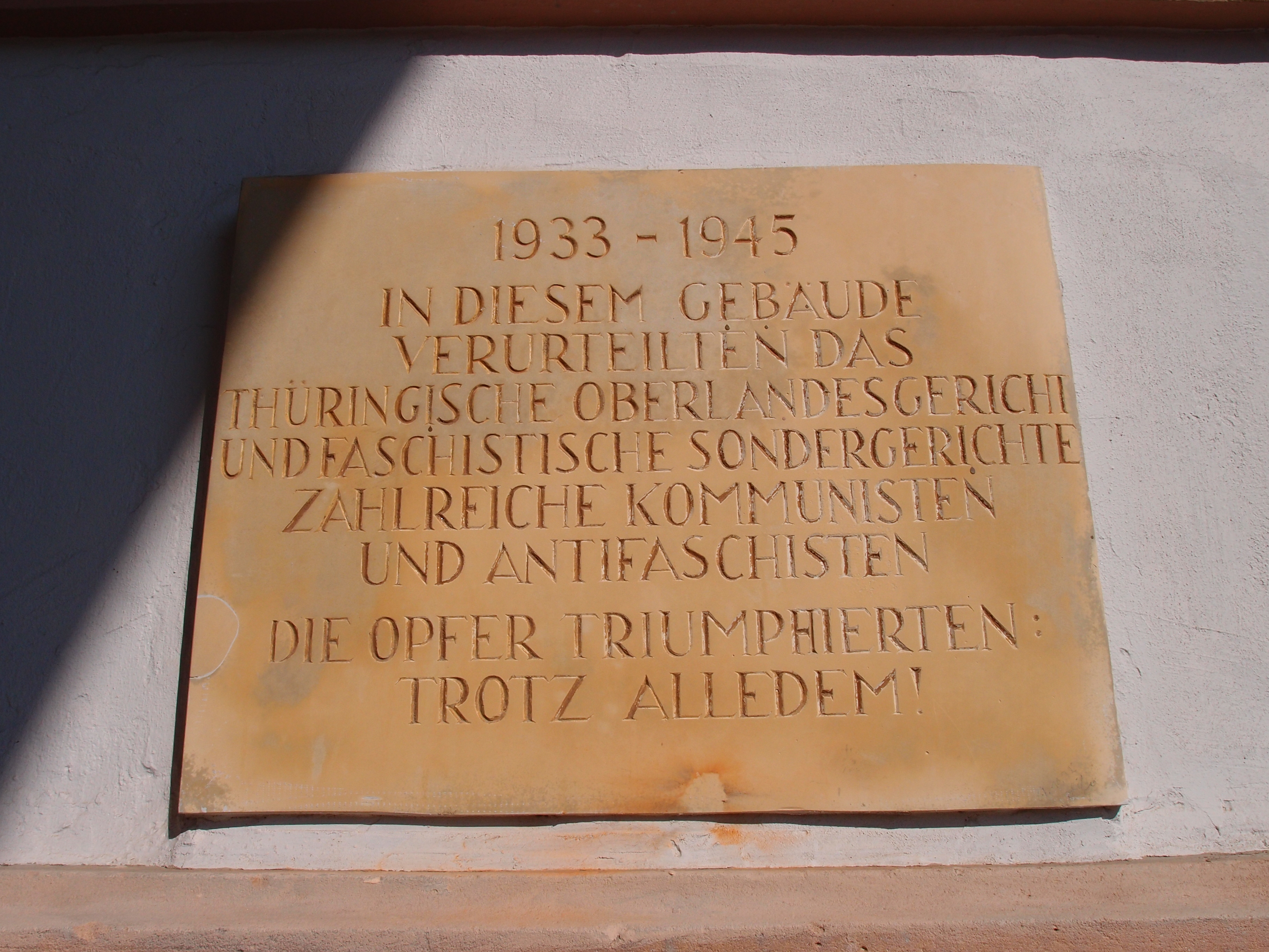 Gedenktafel am Gebäude des alten Thüringer Oberlandesgerichts in Jena, August Bebel Straße 4.